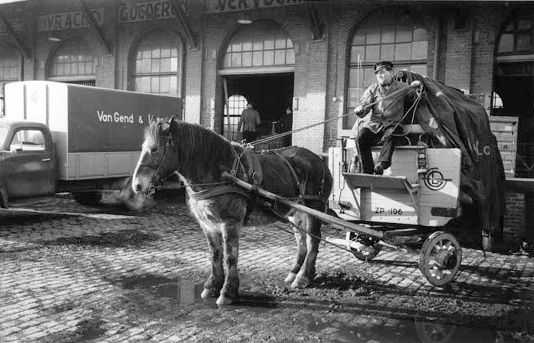 Voormalig Van Gend & Loos expeditiecentrum aan de Statensingel (tegenwoordig Frontensingel) in Maastricht-Bosscherveld. Fotocollectie RHCL Maastricht, GAM 5739.